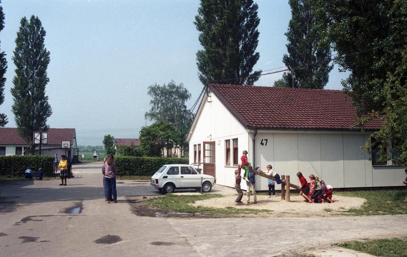 Juni 1988 Friedland Grenzdurchgangslager für Aussiedler und Flüchtlinge